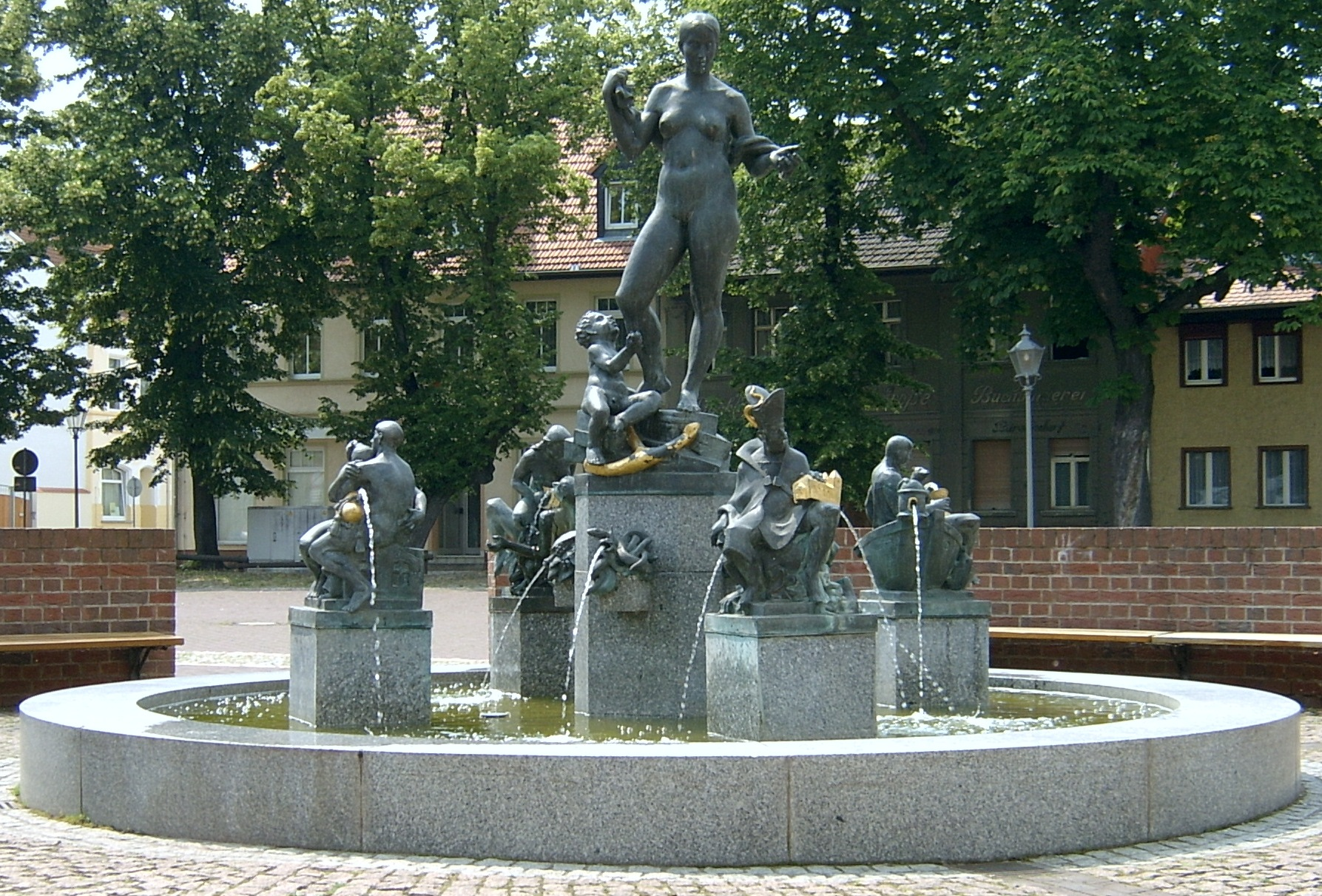 Springbrunnen auf dem Marktplatz in Aken (Elbe).